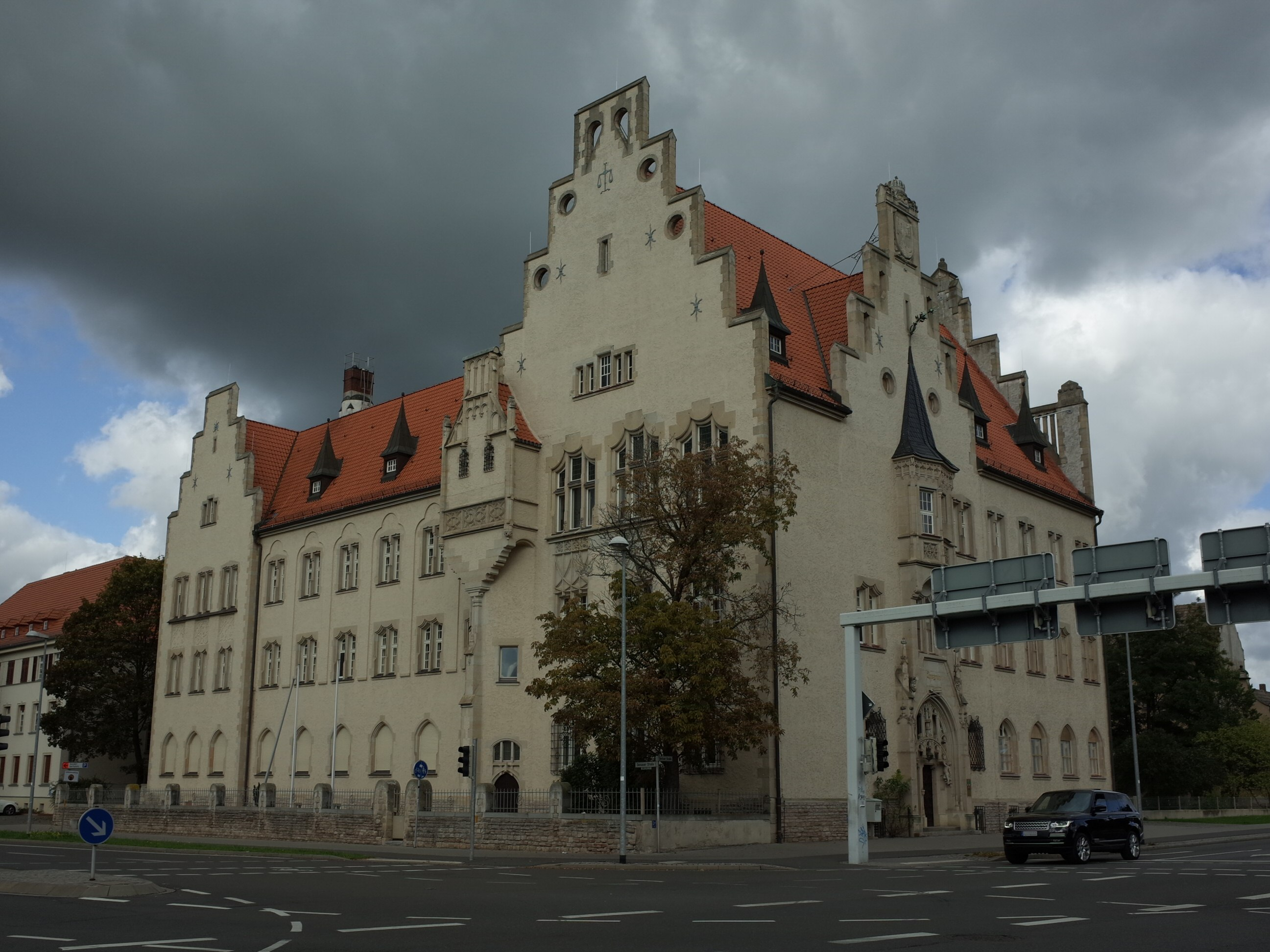 Lutherstadt Wittenberg, Dessauer Straße 291, Gerichtsgebäude (Baudenkmal im Denkmalverzeichniss Sachsen-Anhalt, Erfassungsnummer: 094 35568 000 000 000 000 [1])